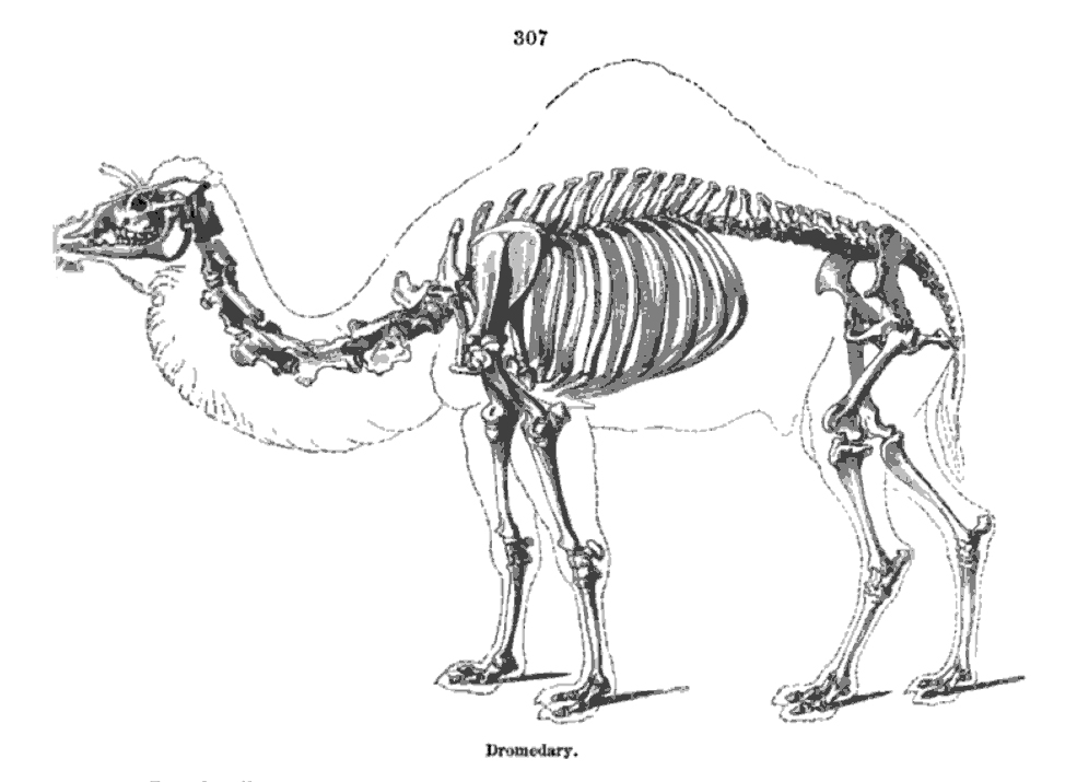 camel skeleton